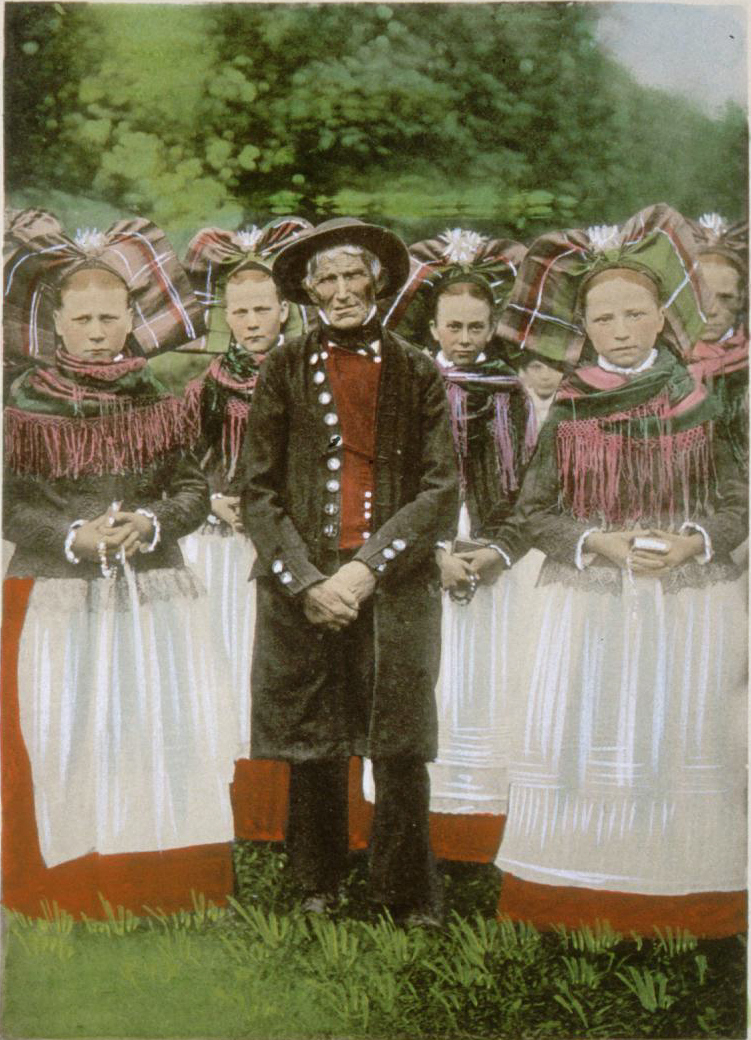 Hacheur de choucroute et jeunes filles de Bitschhoffen en costumes traditionnels alsaciens.